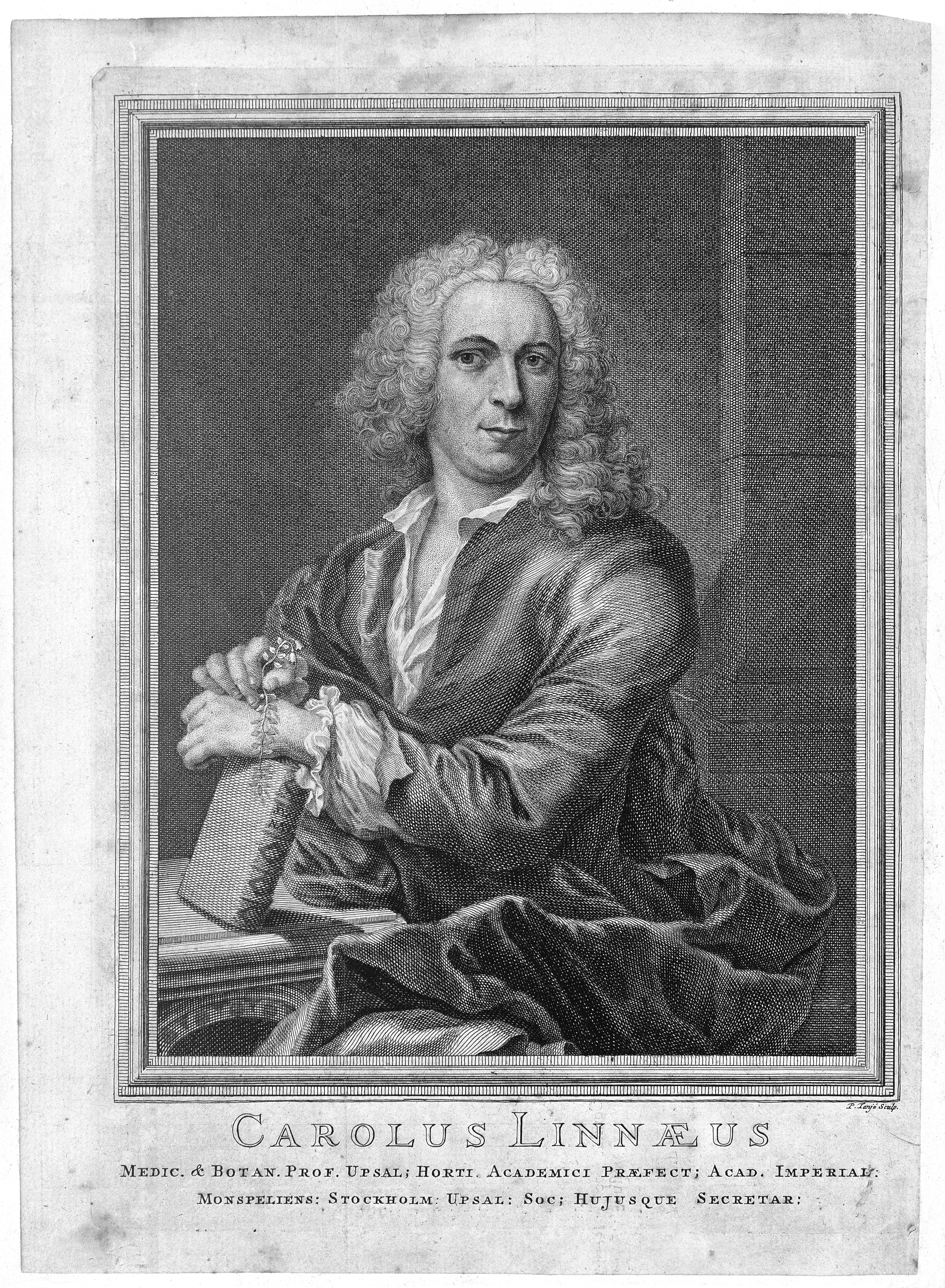 Wellcome Images